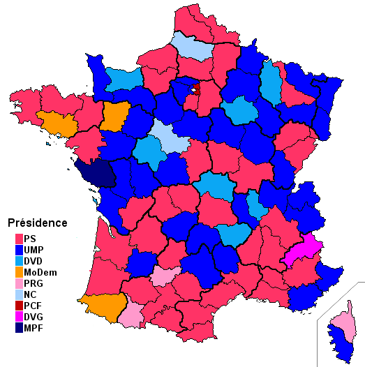 Carte des présidences des conseils généraux avant les élections cantonales françaises de 2008.png